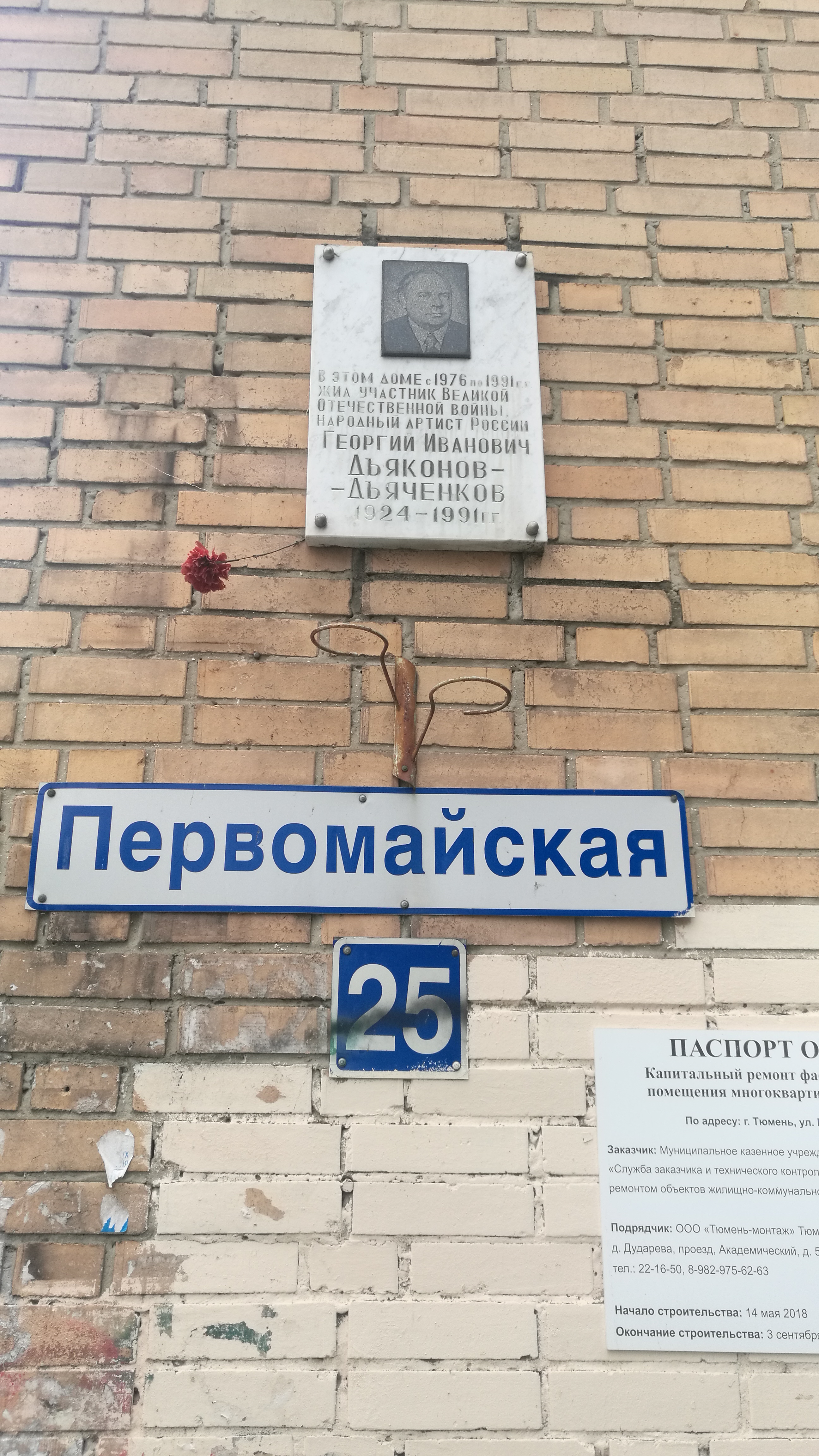 Memortabulo pri Georgij Djakonov-Djaĉenko. Strato Pervomajskaja 25. Tjumeno, Rusio.